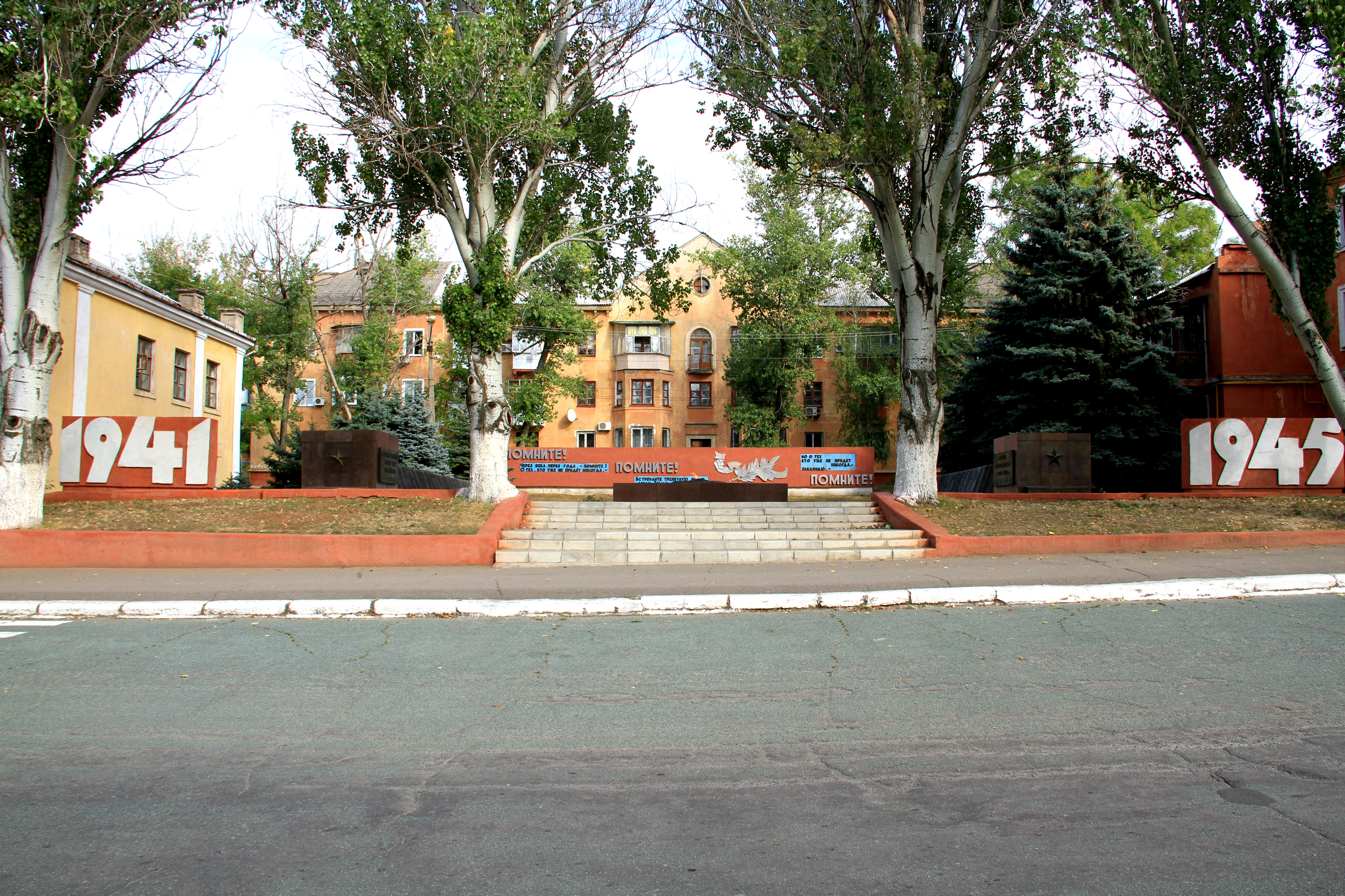 Група могил (3 братські і 1 індивідуальна), де поховані партизани-жертви фашизму та радянські воїни, які загинули в період окупації м. Марганець (серпень 1941 р. — лютий 1944 р.). Поховано 134 люд., Марганець, вул. Радянська, 64-66